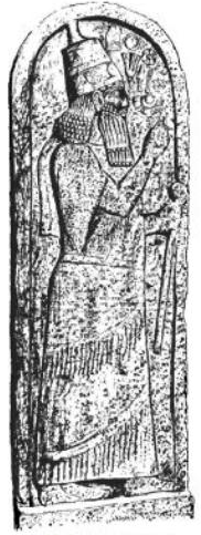 (Original text: De stele van Kition van Sargon II.)